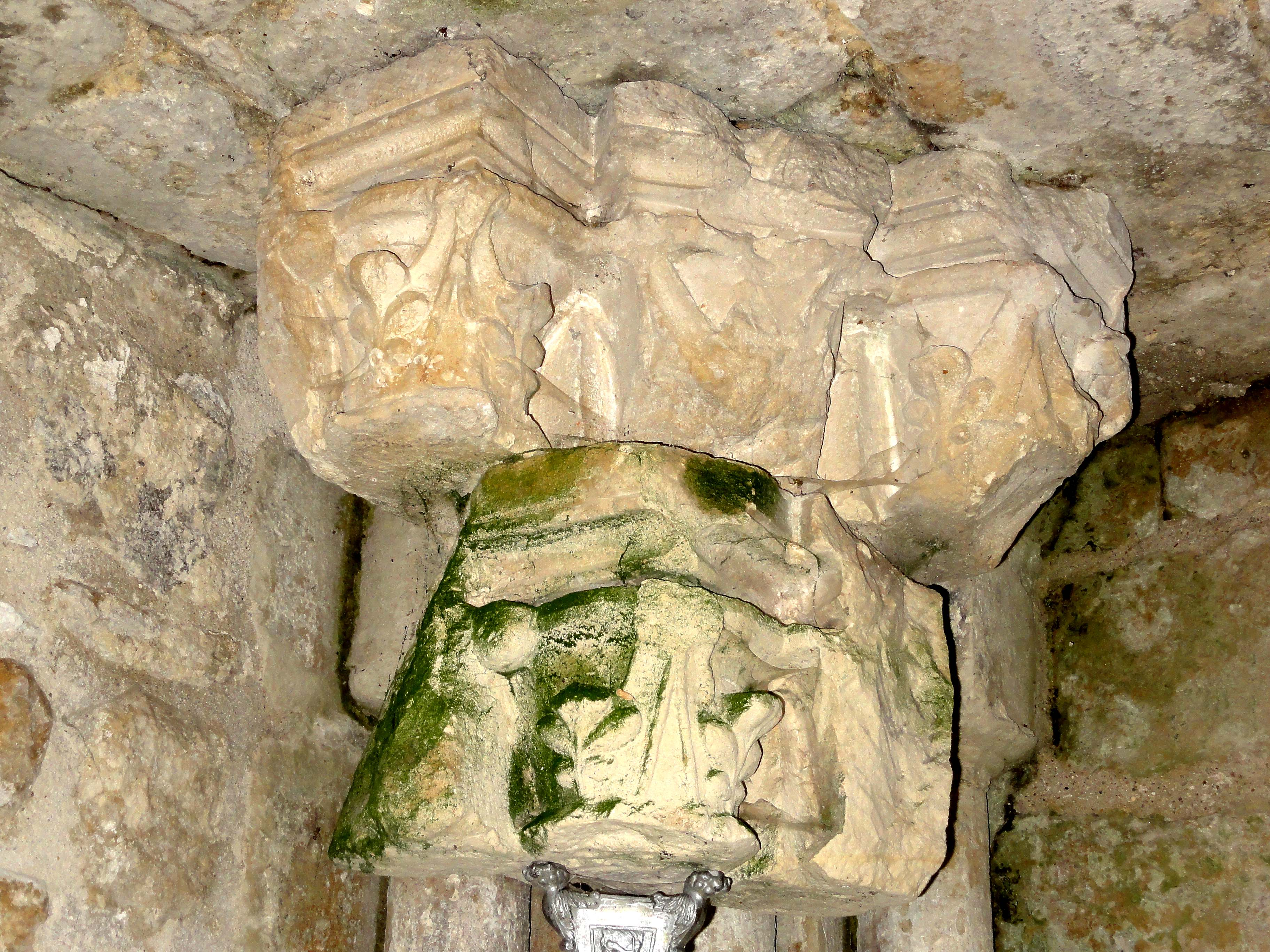 Intérieur de l'église (voir titre).